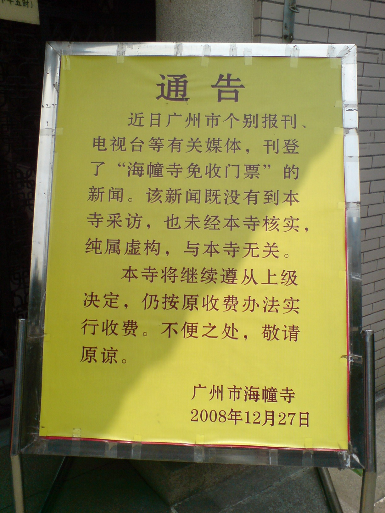 海幢寺通告